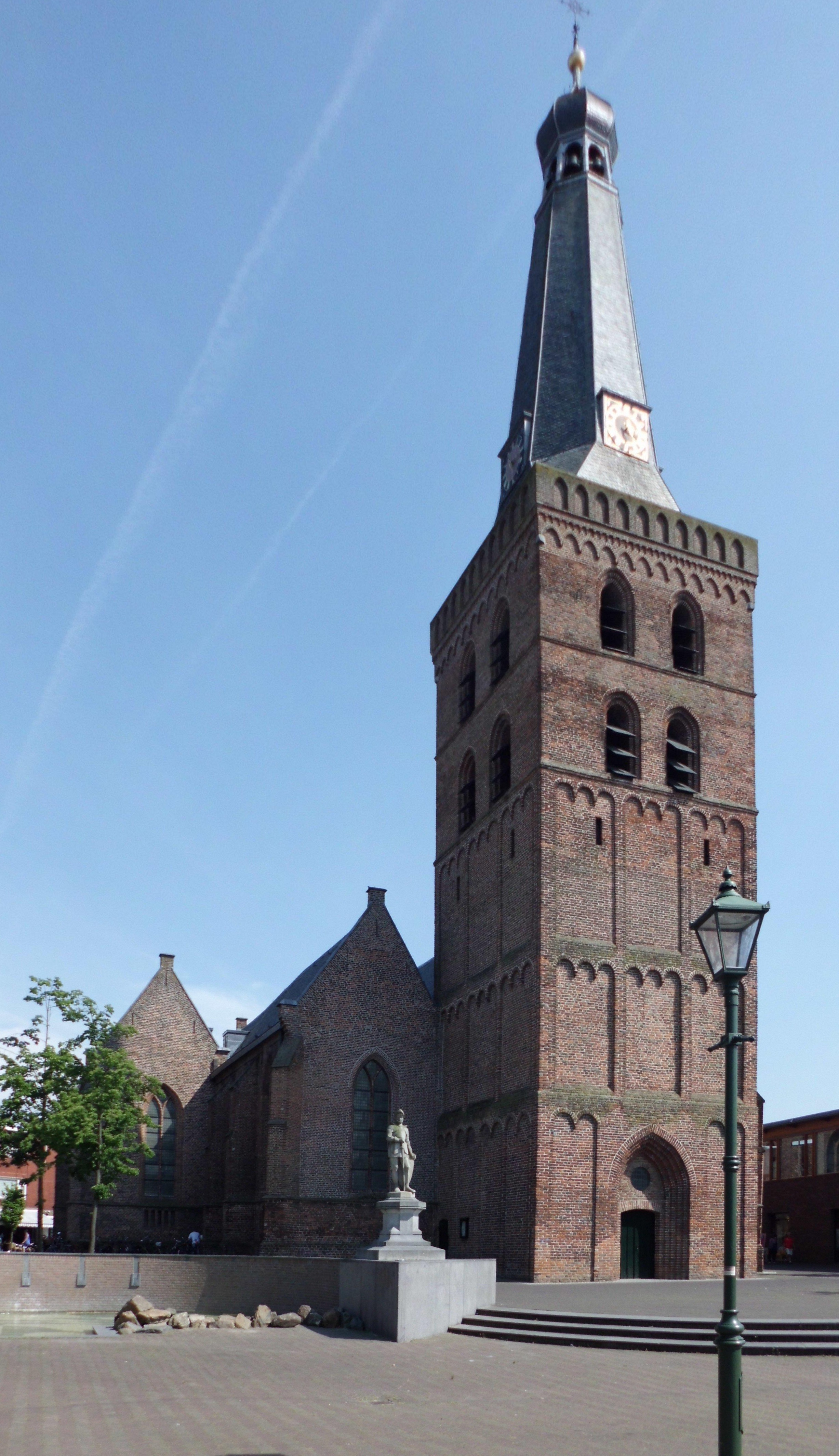 Beeld van Jan van Schaffelaar, met op de achtergrond de kerk waar hij vanaf gesprongen is